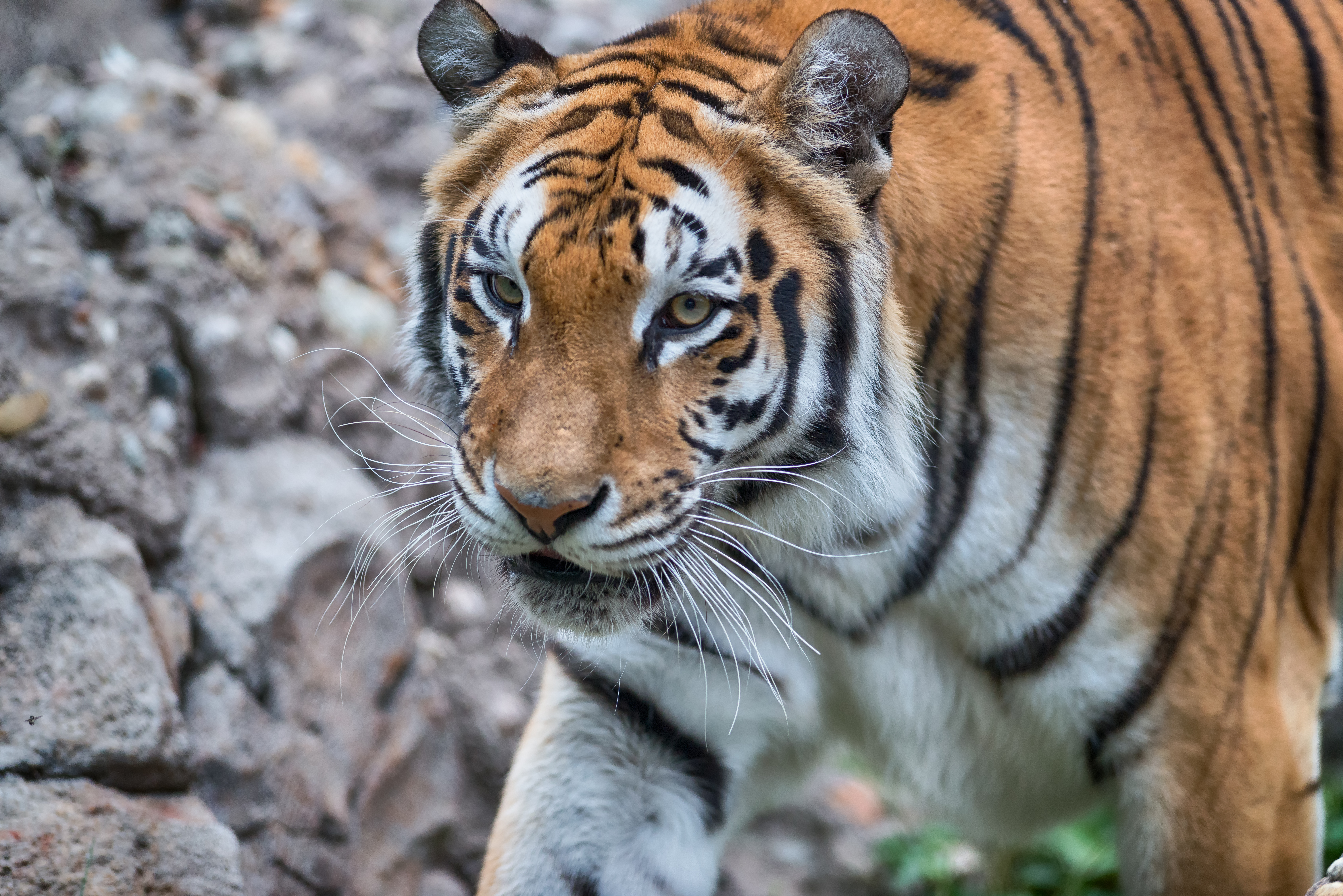 Tiger Walking by Rocks